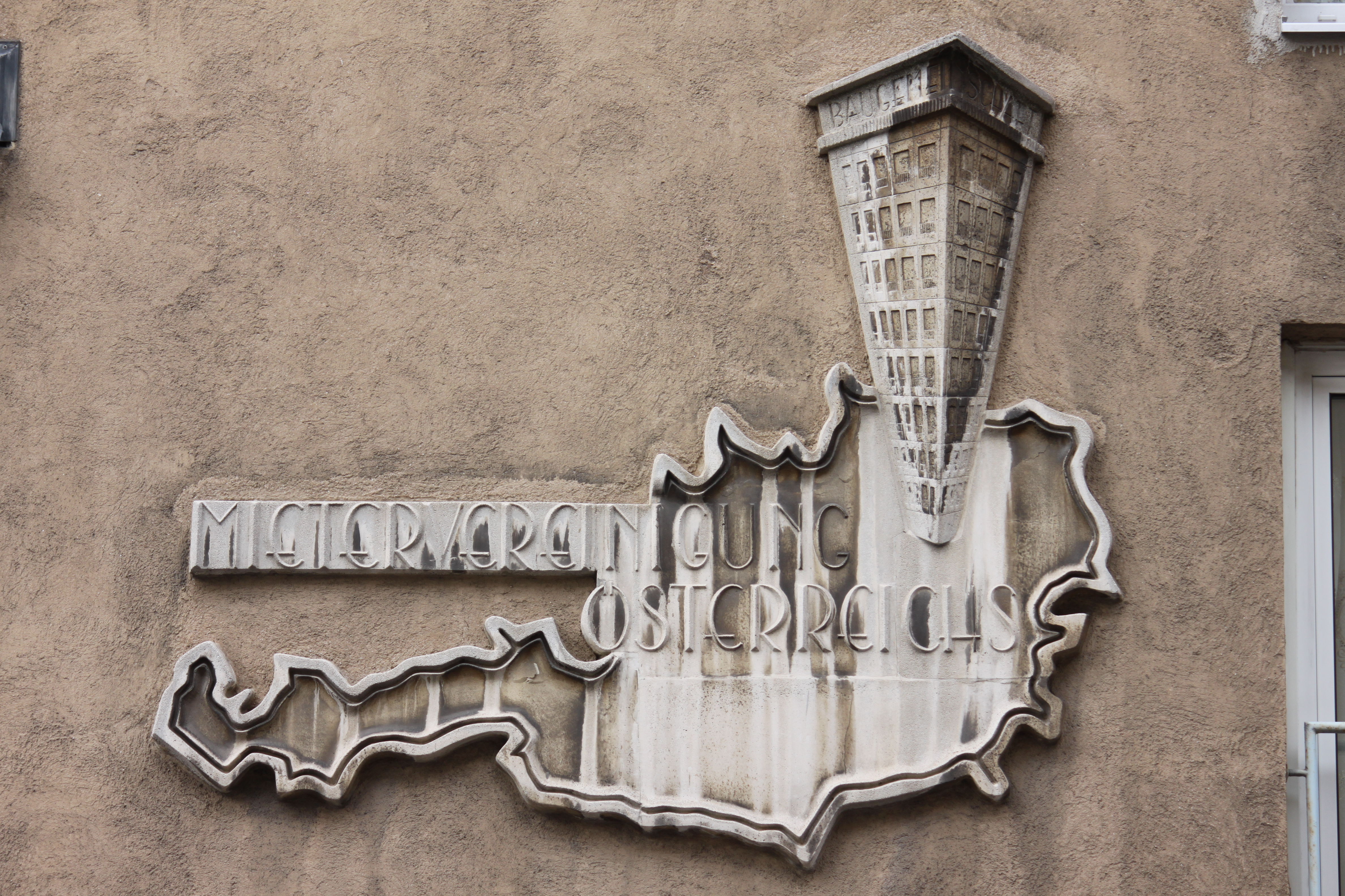 Waldmüllergasse 19-21, Detail, Logo der Mietervereinigung Österreichs